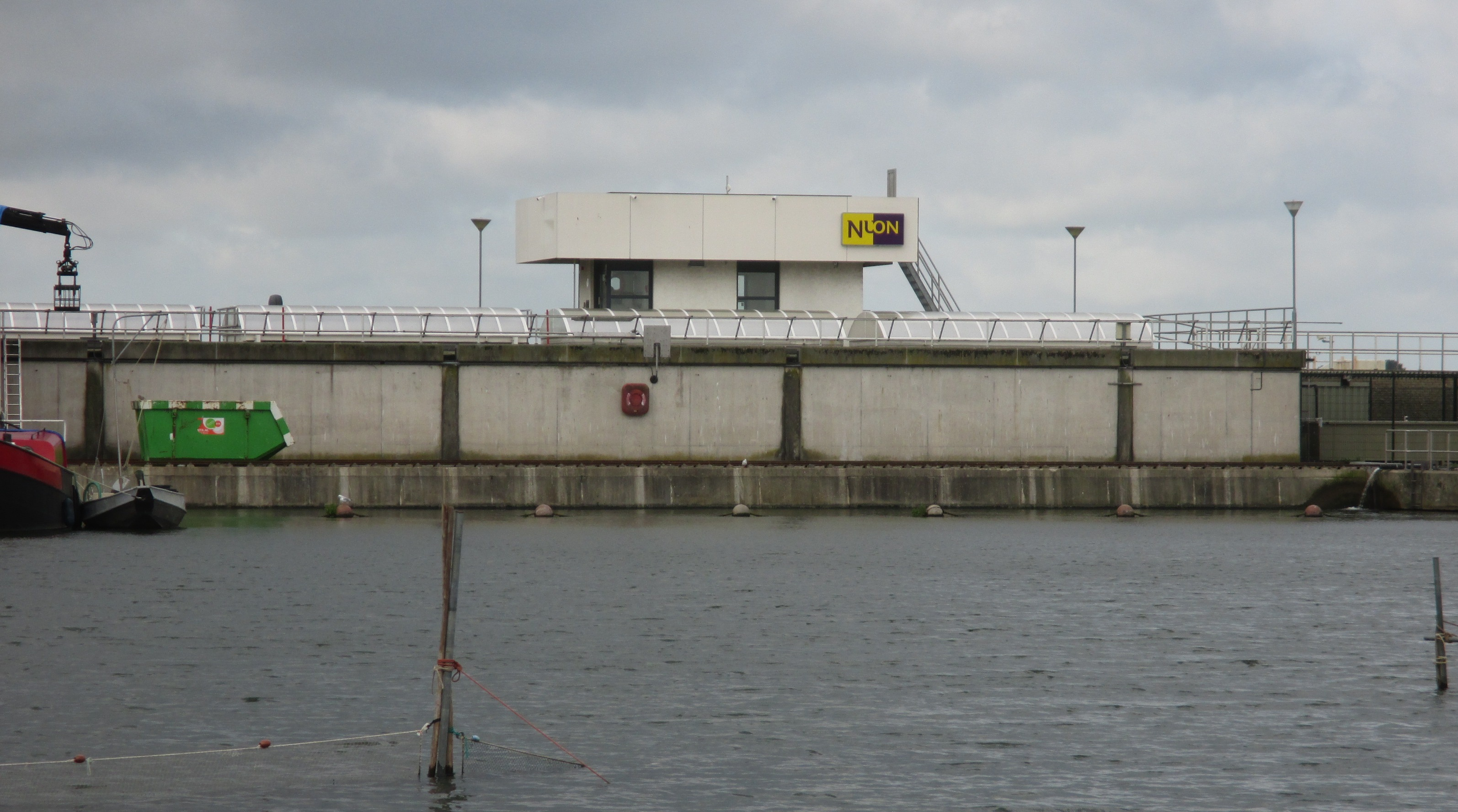 Waterkrachtcentrale Maurik inlaatzijde bovenstrooms